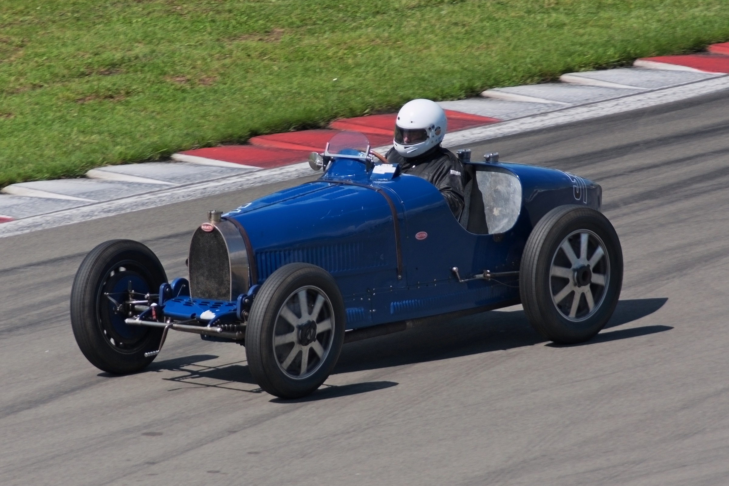 Bugatti Type 51